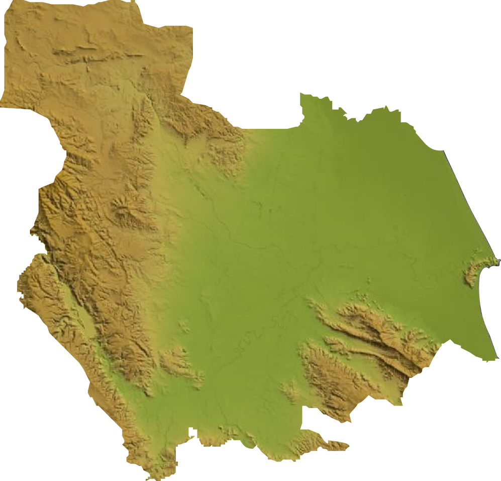 El mapa mostra el relleu topogràfic de la comarca de la Ribera del Xúquer, composta per la Ribera Alta i la Ribera Baixa.